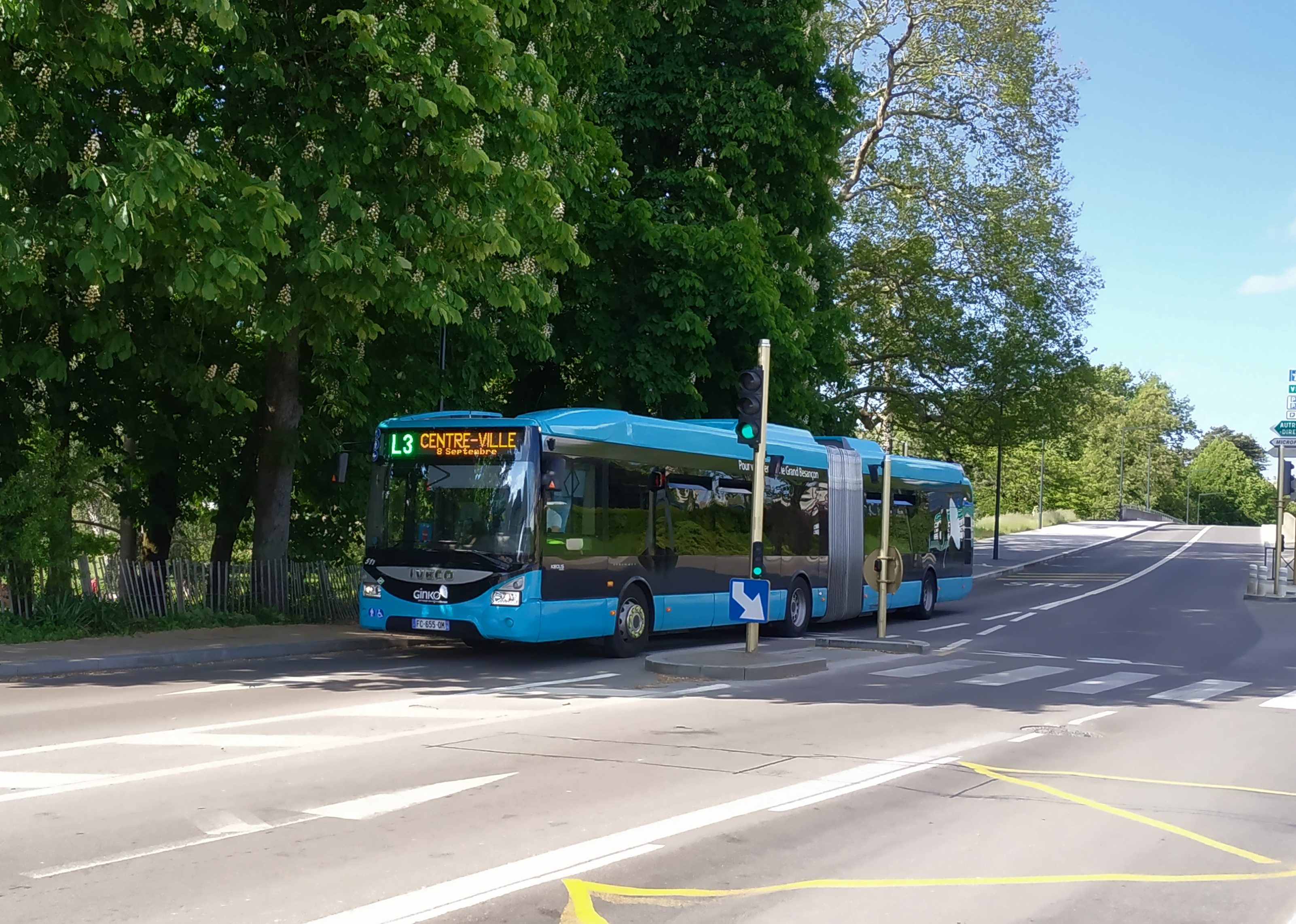 Iveco Urbanway 18, Ginko, gare de Besançon-Viotte